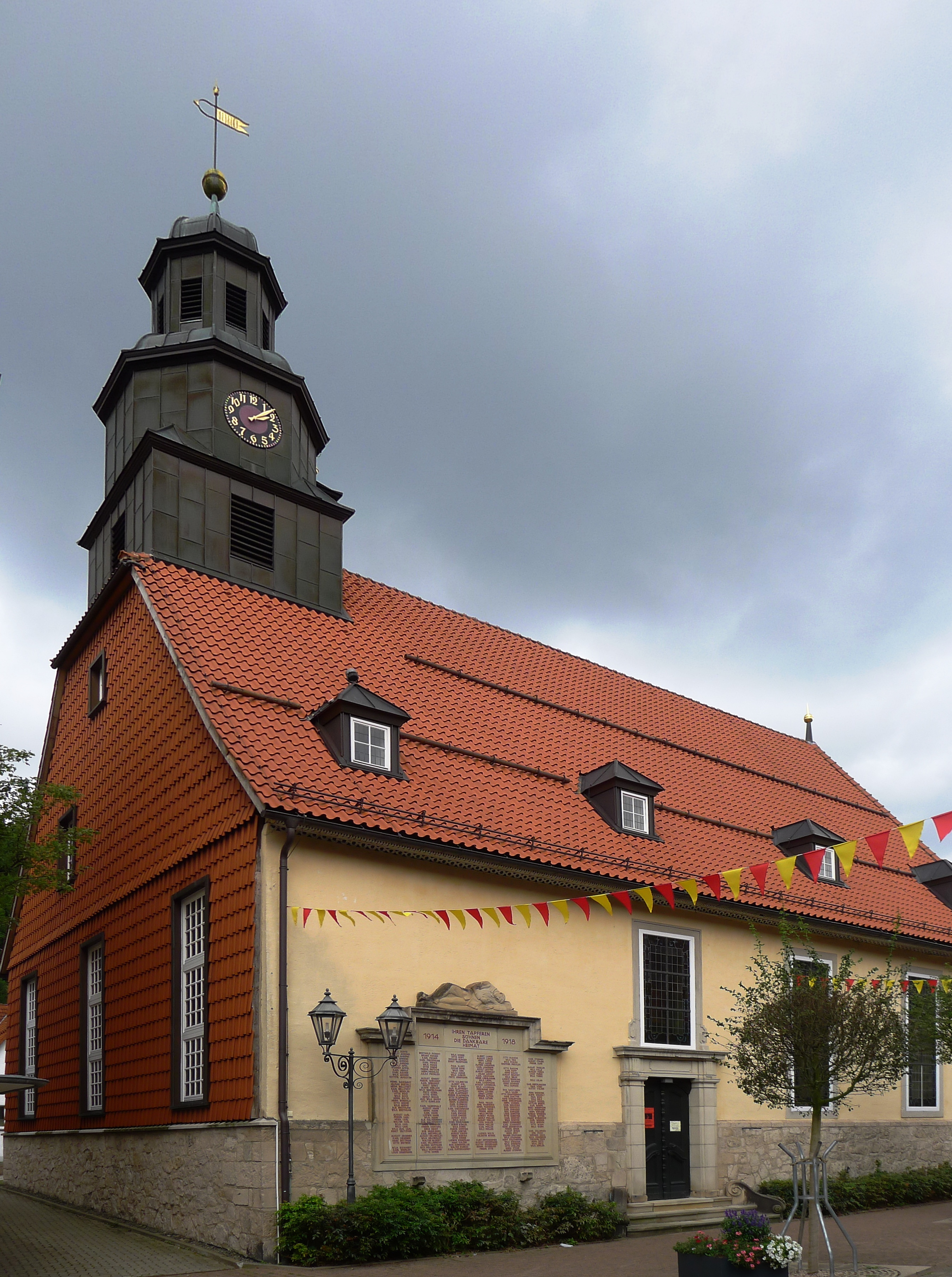 Blick von der Hauptstraße auf die Kirche